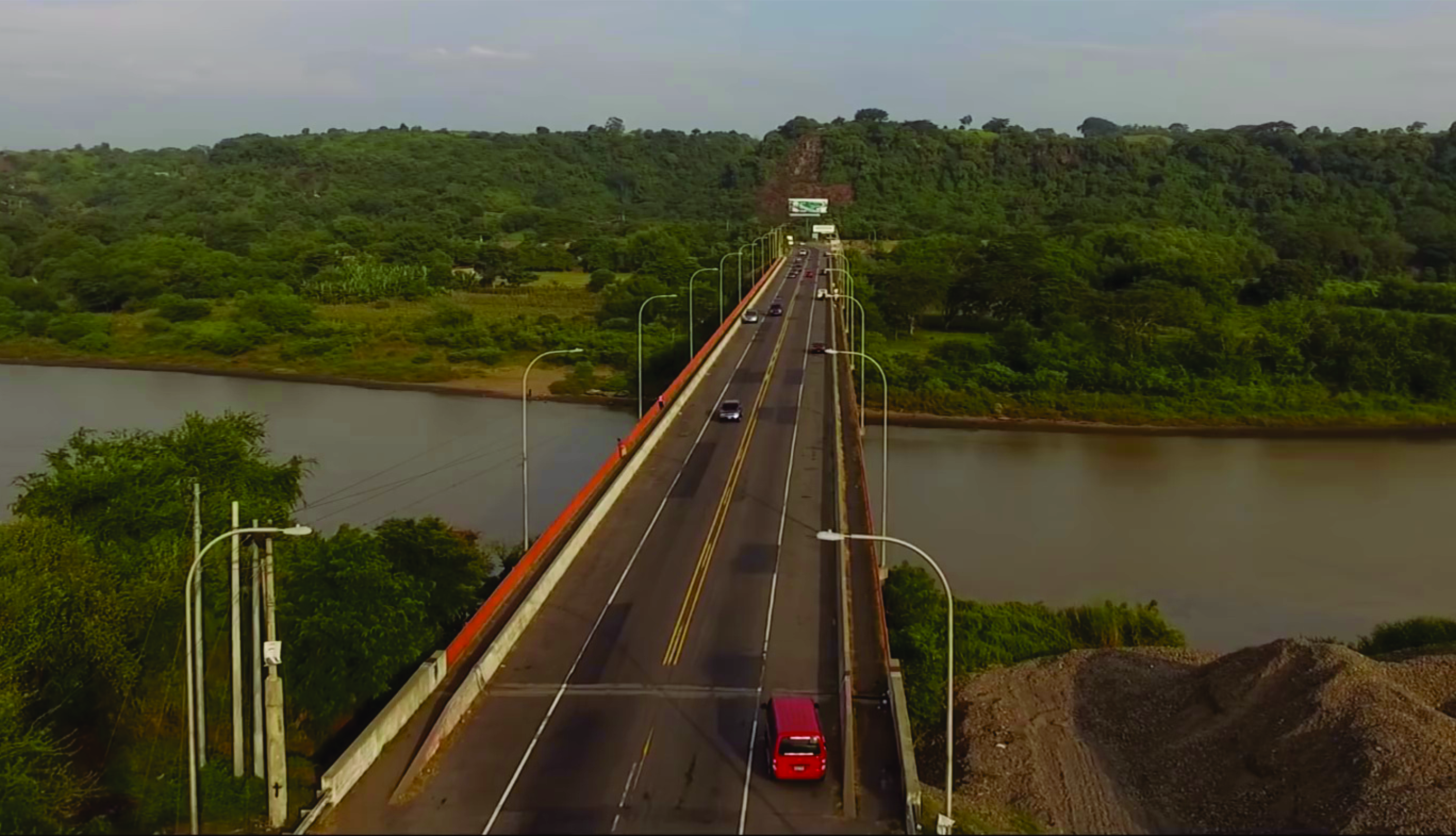 Vista del Puente Cuscatlán